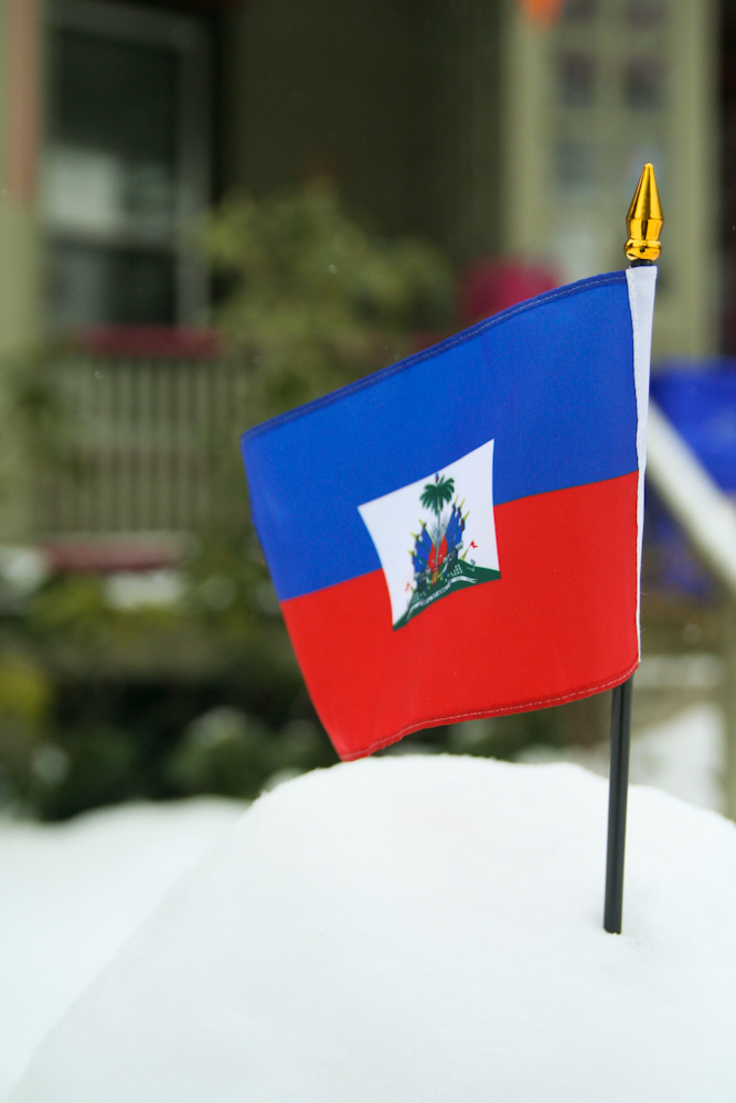 Haitian Flag 2-26-10 2